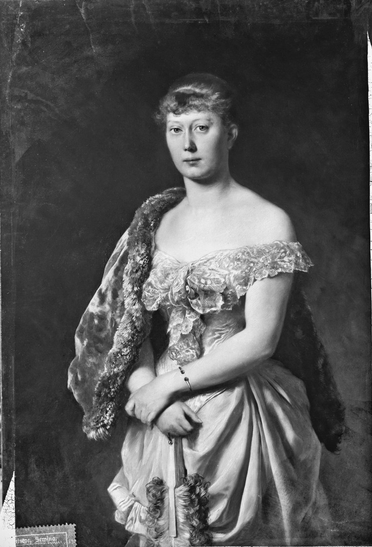 Sophie Marie Luise Amalie Josephine (Tochter des Prinzen von Baden), verheiratet mit Friedrich II. Herzog von Anhalt, Kniestück im 23. Lebensjahr